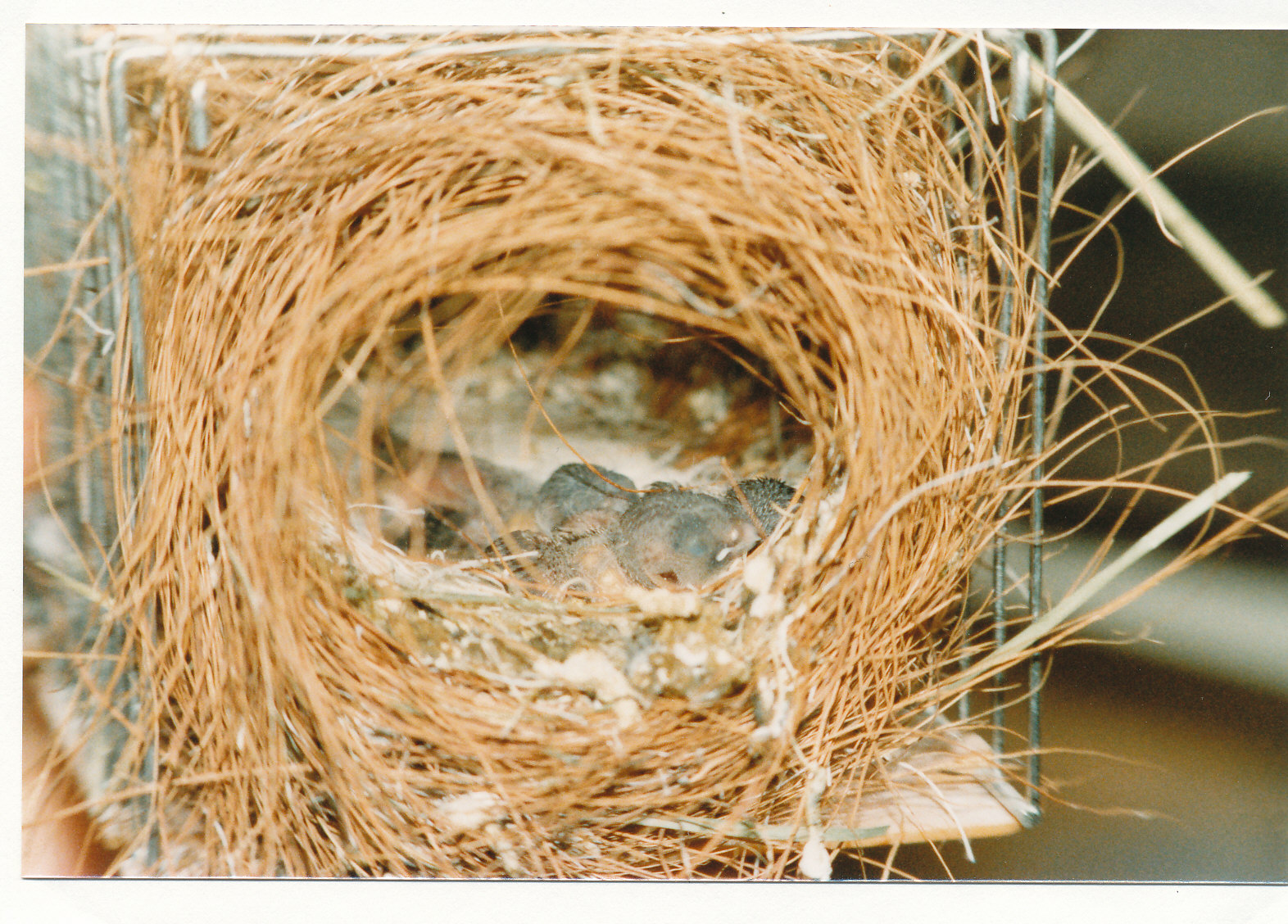 Jungvögel noch im Nest